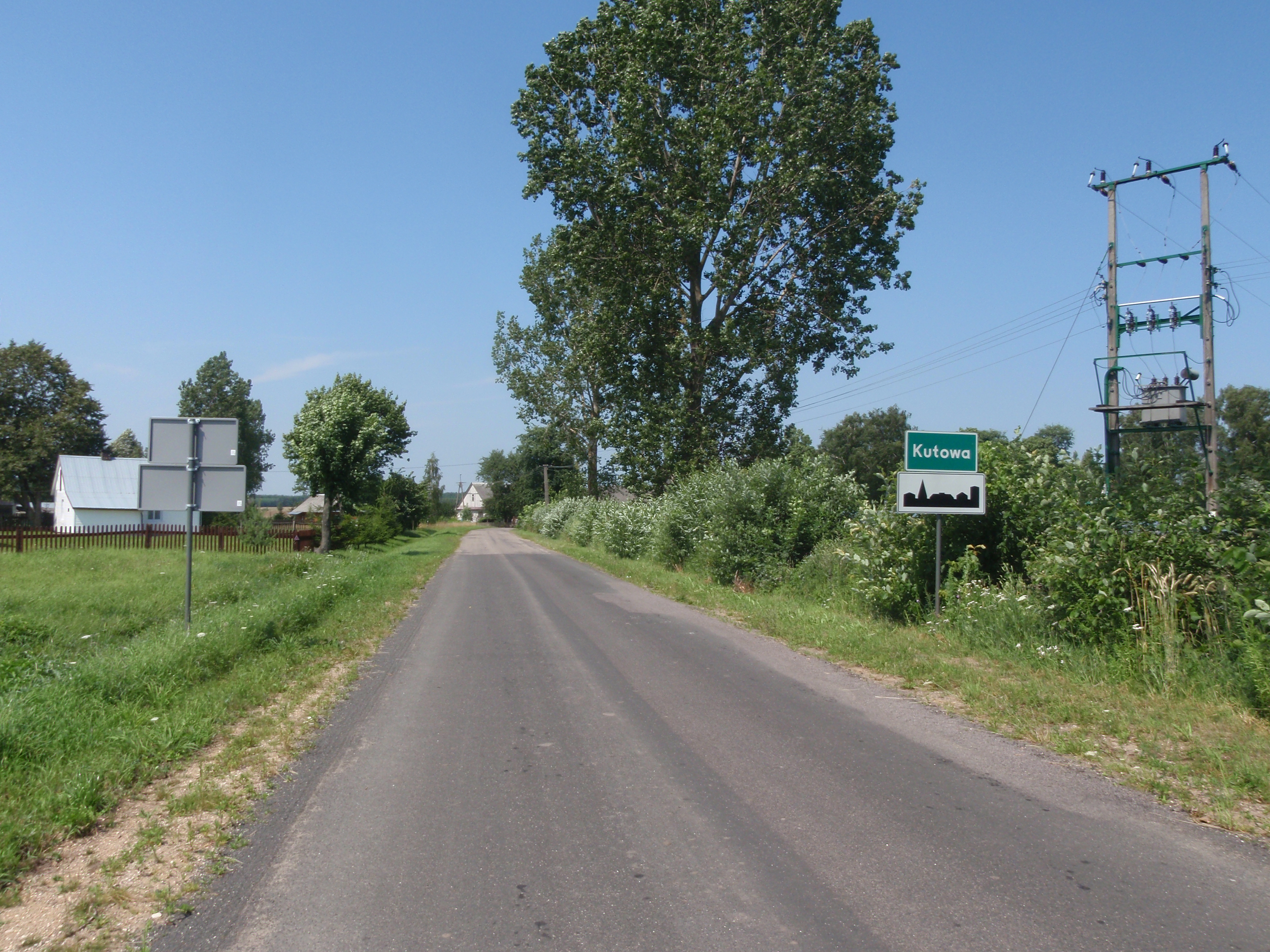 wjazd do wsi Kutowa od strony Łosinki